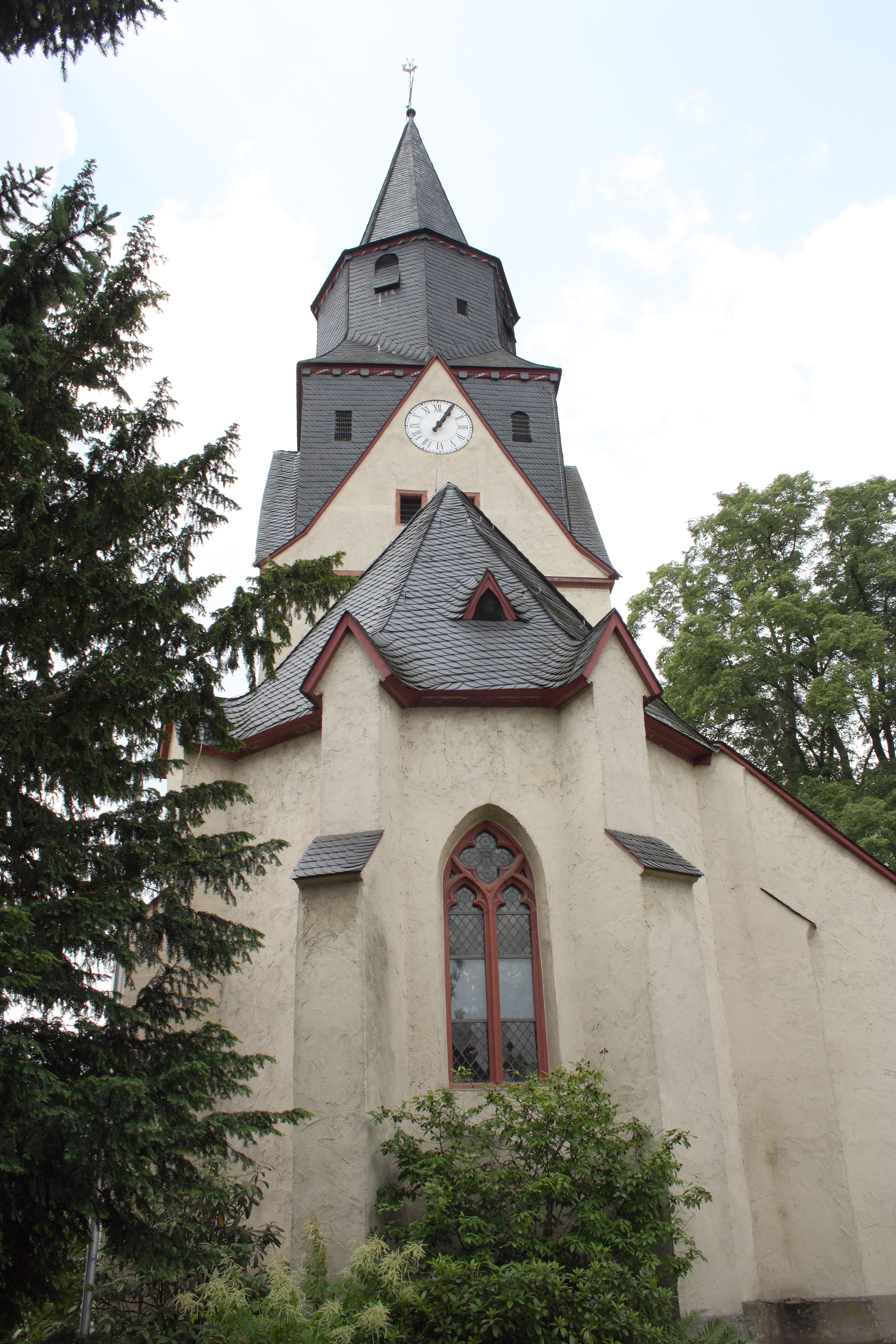 Evangelische Kirche in Heuchelheim im Landkreis Gießen (Hessen)